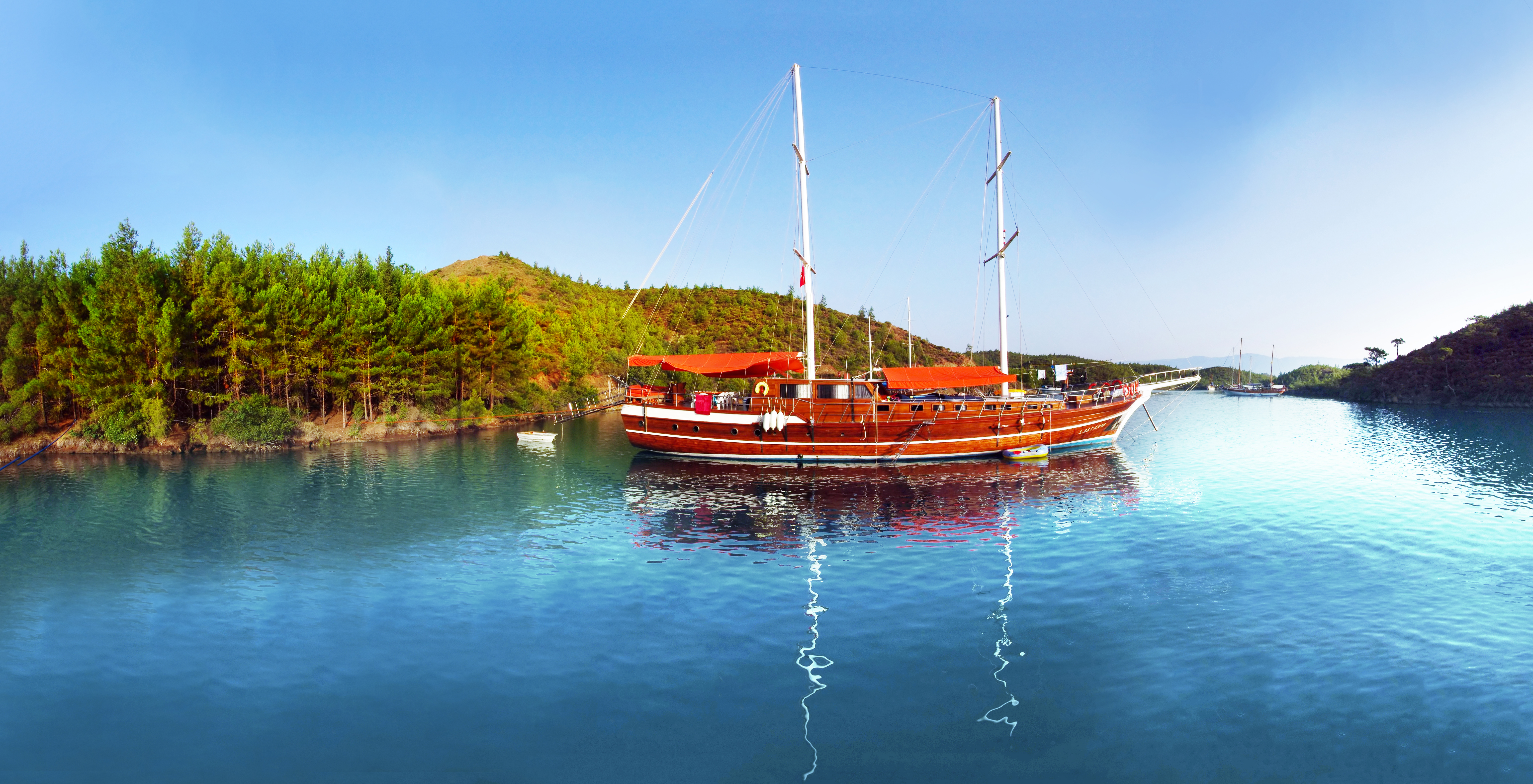 İngiliz limanı